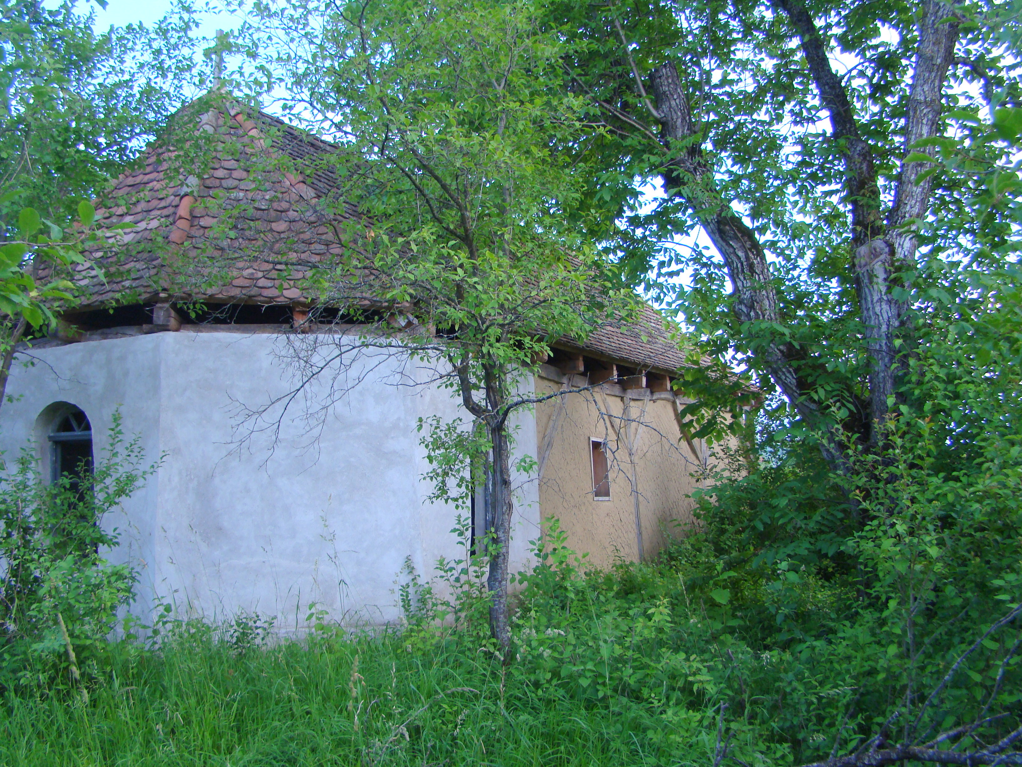 Biserica de lemn „Cuvioasa Paraschiva”, sat Grânari; comuna Jibert, str. Școlii, în cimitirul ortodox vechi sec. XVIII